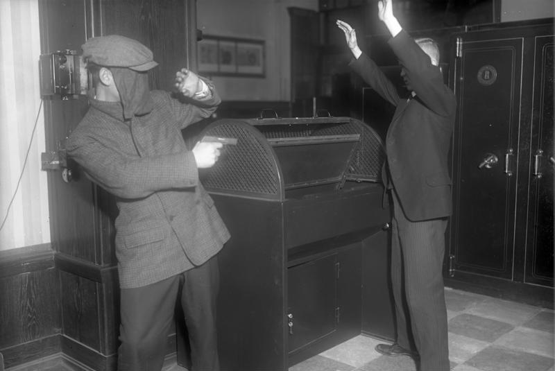 Hilfe, Überfall!!! Bankschalterraum unmöglich! An den Bankschaltern der Grossbanken und Sparkassen hat man ganz neuartige Überfallzahltische, welche das Rauben von Geld unmöglich machen, aufgestellt. Der Überfallzahltisch, eine Erfindung der Geldschrankfabrik Arnheim, kann bei beabsichtigtem Überfall von verschiedenen Stellen des Kassenraumes aus in Tätigket gesetzt werden. Durch Druck auf einen Knopf dreht sich das ganze Zahlenbrett mit rasender Geschwindigkeit und das daraufliegende Geld verschwindet in den darunterliegenden Tesor. Durch die Auslösung ertönt ein Alarmsignal, welches das Publikum ausserhalb des Bankhauses auf den Überfall aufmerksam macht. Durch Druck auf einen Knopf an einer anderen Stelle im Kassenraum wurde der Überfalltisch in Tätigkeit gesetzt. Das Geld ist in dem Tresor verschwunden und der Räuber muss fliehen.